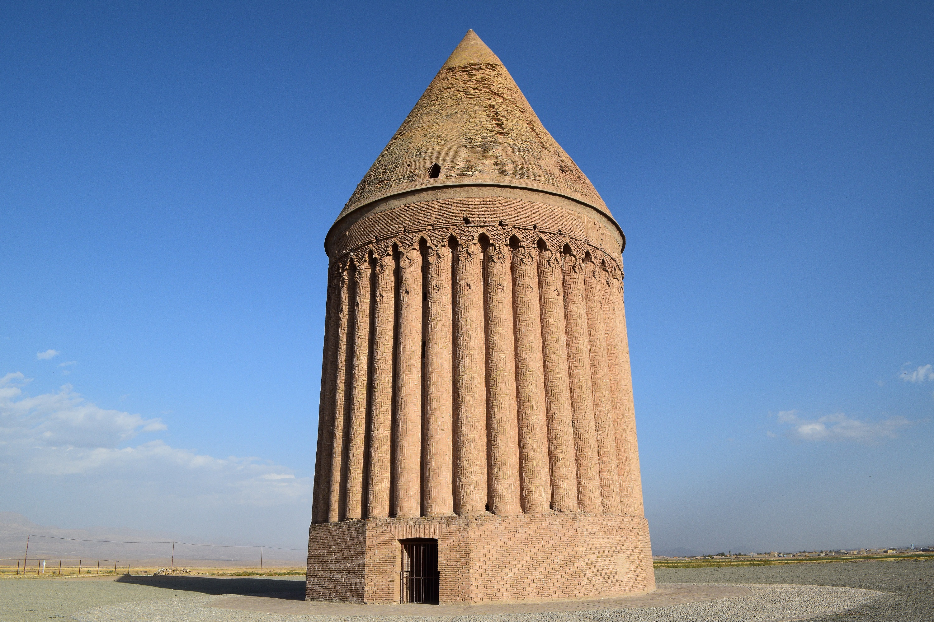 برج مقبره رادکان